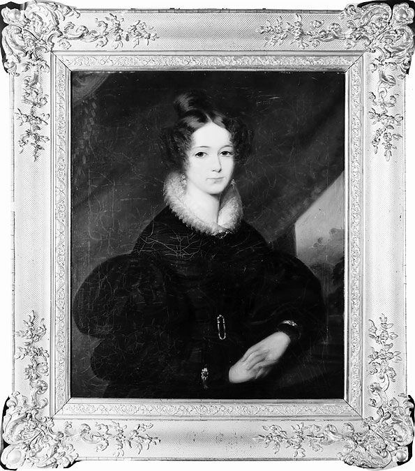 Agnes Prinzessin zu Hohenlohe-Langenburg, verh. mit Erbprinz Constantin